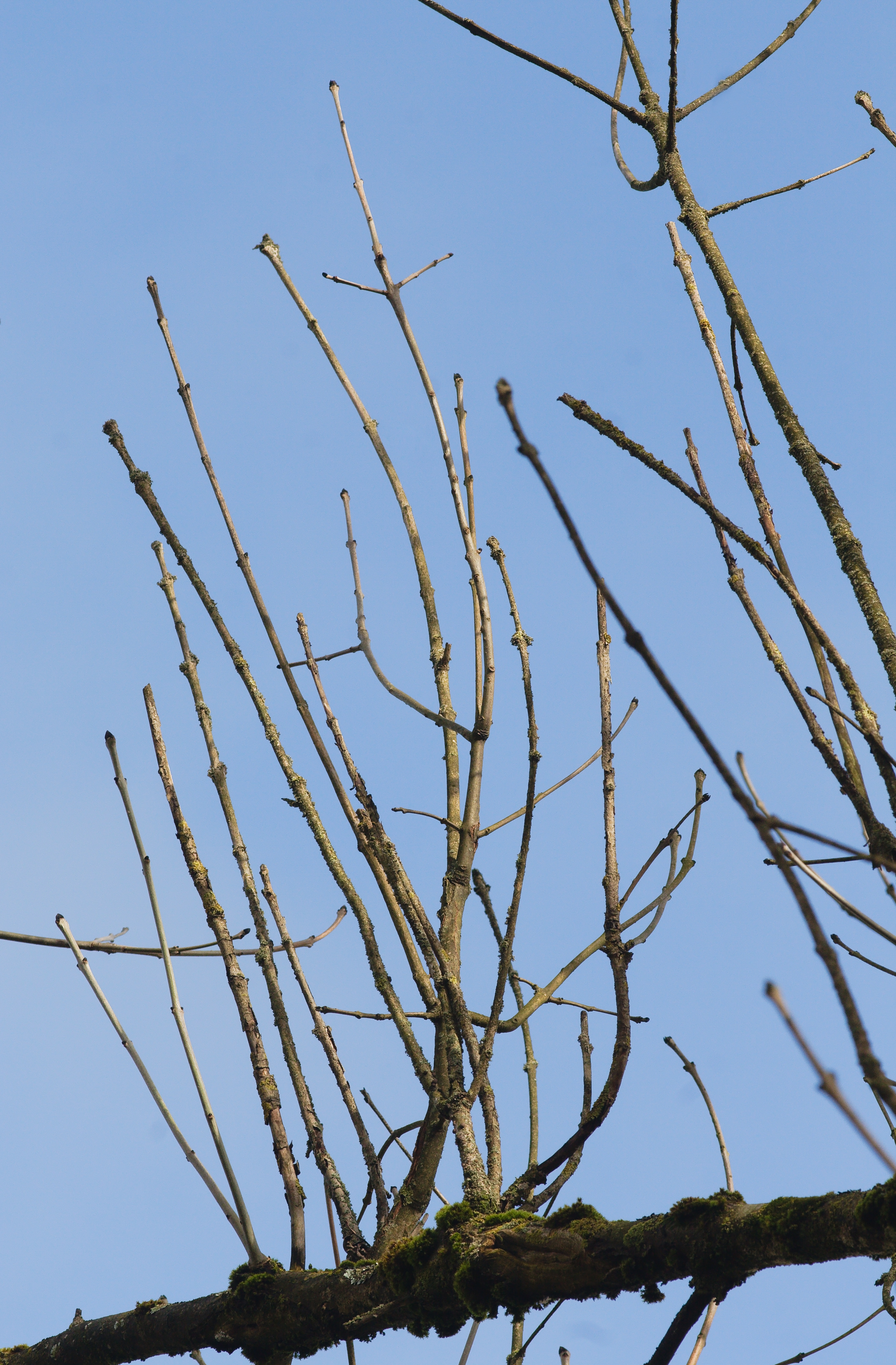 Angsttriebe auf einem Eschenast (Grünburg/Oberösterreich)